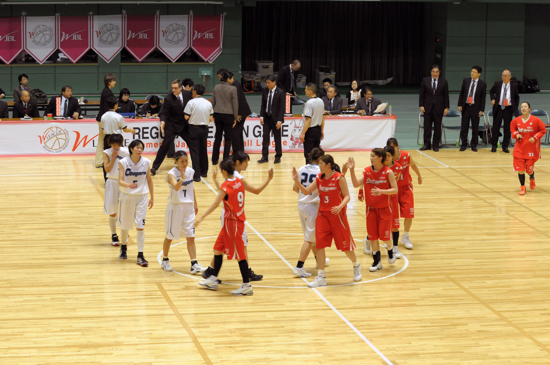 WJBL 13-14レギュラーリーグ、日立ハイテククーガーズ対富士通レッドウェーブ。横須賀アリーナ。